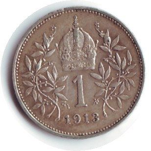 Austria 1913 1 Krone